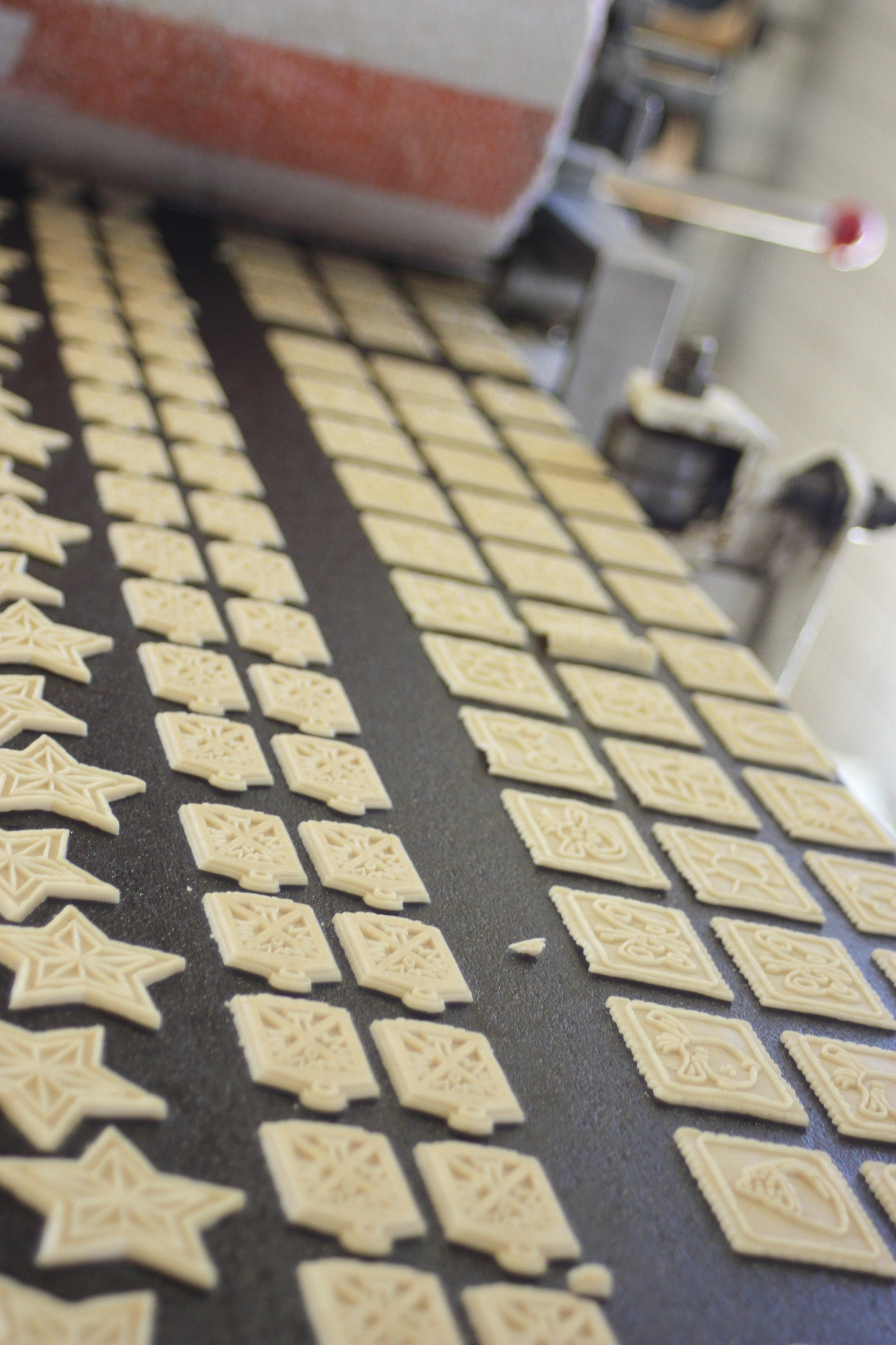 / Biscuits Suter AG, Schönenberg, industrielle Fertigung